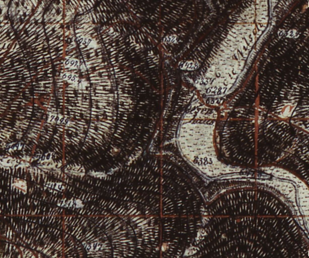 Wilzsch: Ausschnitt aus Blatt 263 der Sächsischen Meilenblätter in der Dresdner Ausgabe von 1791 mit Nachträgen bis ins letzte Viertel des 19. Jahrhunderts. Einmündung des Zigeunerbachs in die Wilzsch. Die Siedlung Neues Wiesenhaus ist eingezeichnet als „Wiesenhaus“, offensichtlich als ein Nachtrag nach 1791, denn Blatt 220 der Berliner Ausgabe (Stand 1791) und Blatt 211 der Freiberger Ausgabe (Stand 1791 mit Nachträgen bis 1876) haben keinen Eintrag des Wiesenhauses. Hinweis: Karte ist nicht genordet. Link zur Karte in der Staats- und Universitätsbibliothek Dresden